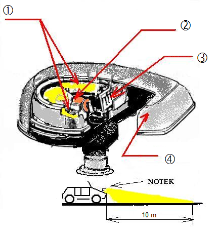 Skizze der Notek-Tarnleuchte